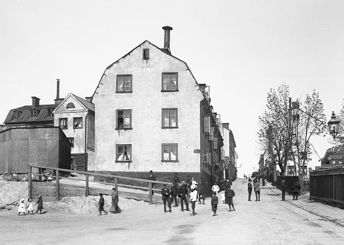 Yttersta Tvärgränd 10 norrut från Lundagatan